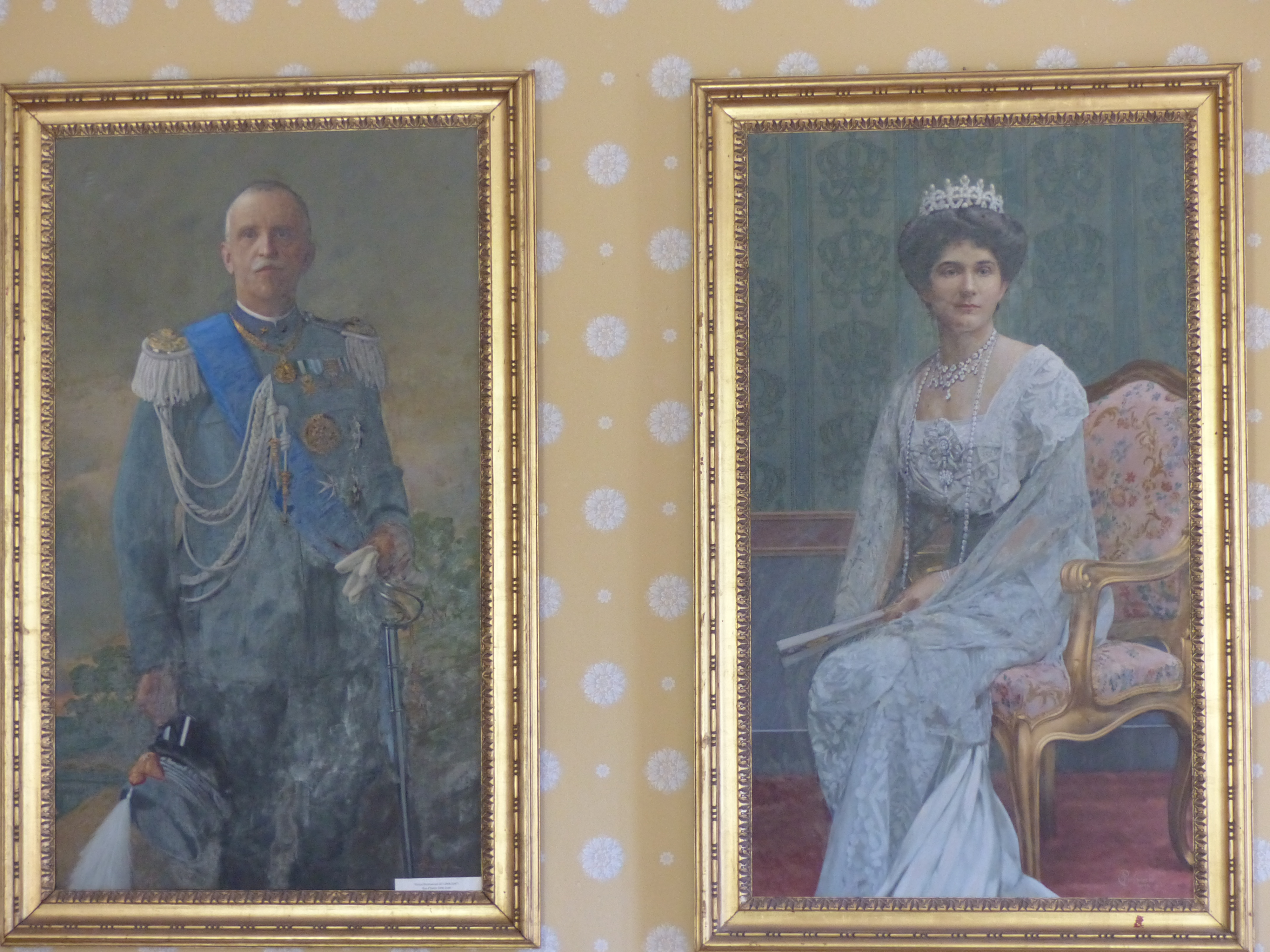 Portraits de Victor-Emmanuel III et de sa femme Hélène de Monténégro, situés dans les appartements privés du roi Charles-Félix de Savoie et de Marie-Christine de Bourbons-Sicile à l'abbaye d'Hautecombe